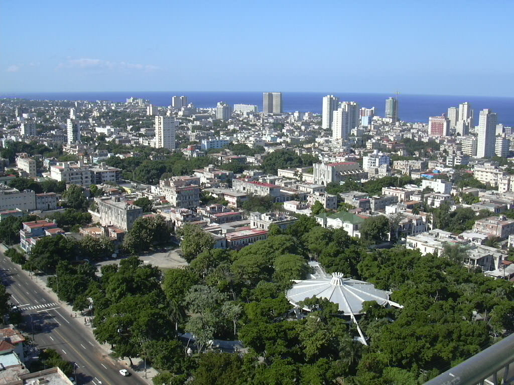 Imagen tomada desde el Hotel Habana Libre hacia la zona centrica del Vedado, Municipio Plaza, La Habana. Cuba. Puede verse el techo de la heladeria Coppelia